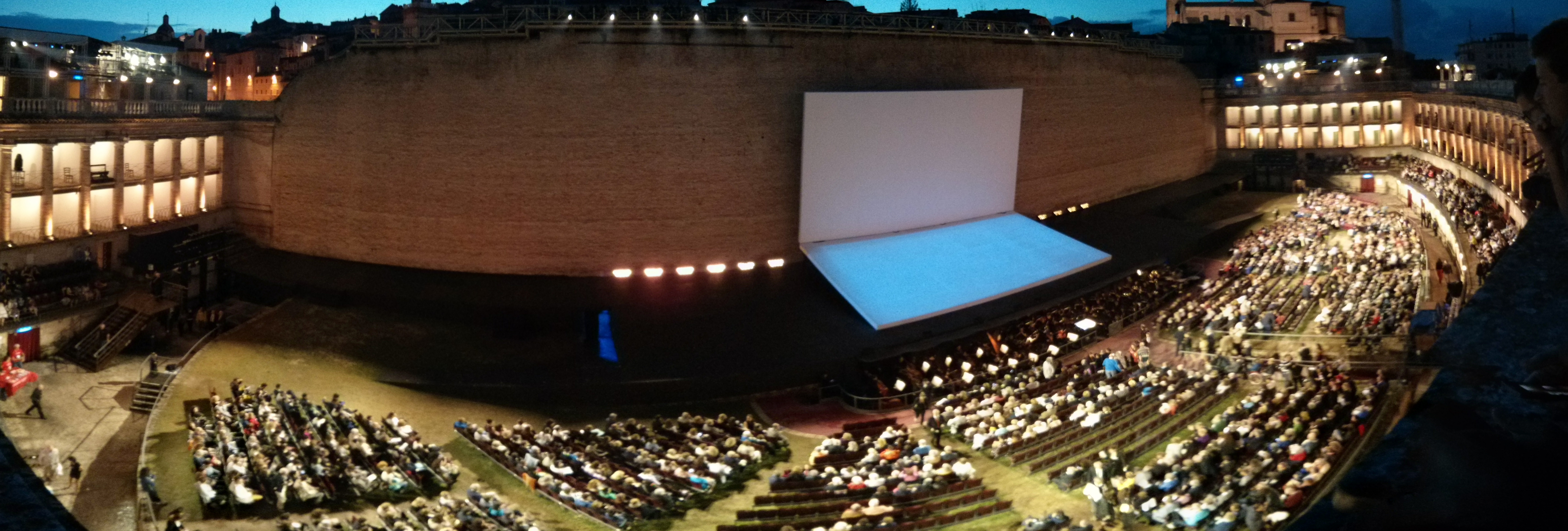 Vista dalla balconata dello Sferisterio di Macerata e del profilo della città al tramonto, prima dell'Aida